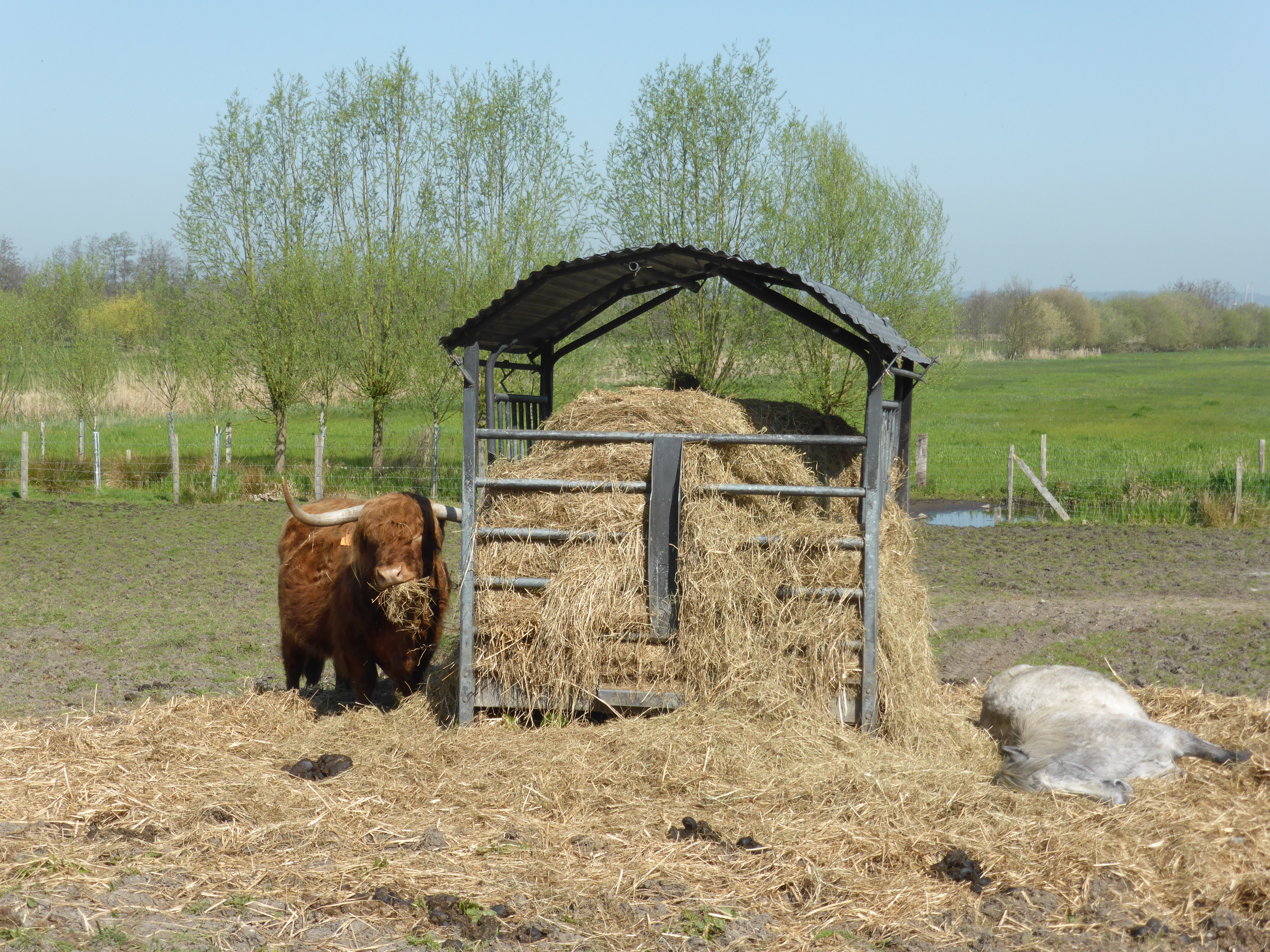 Route des chaumières dans le Marais Vernier (Eure)